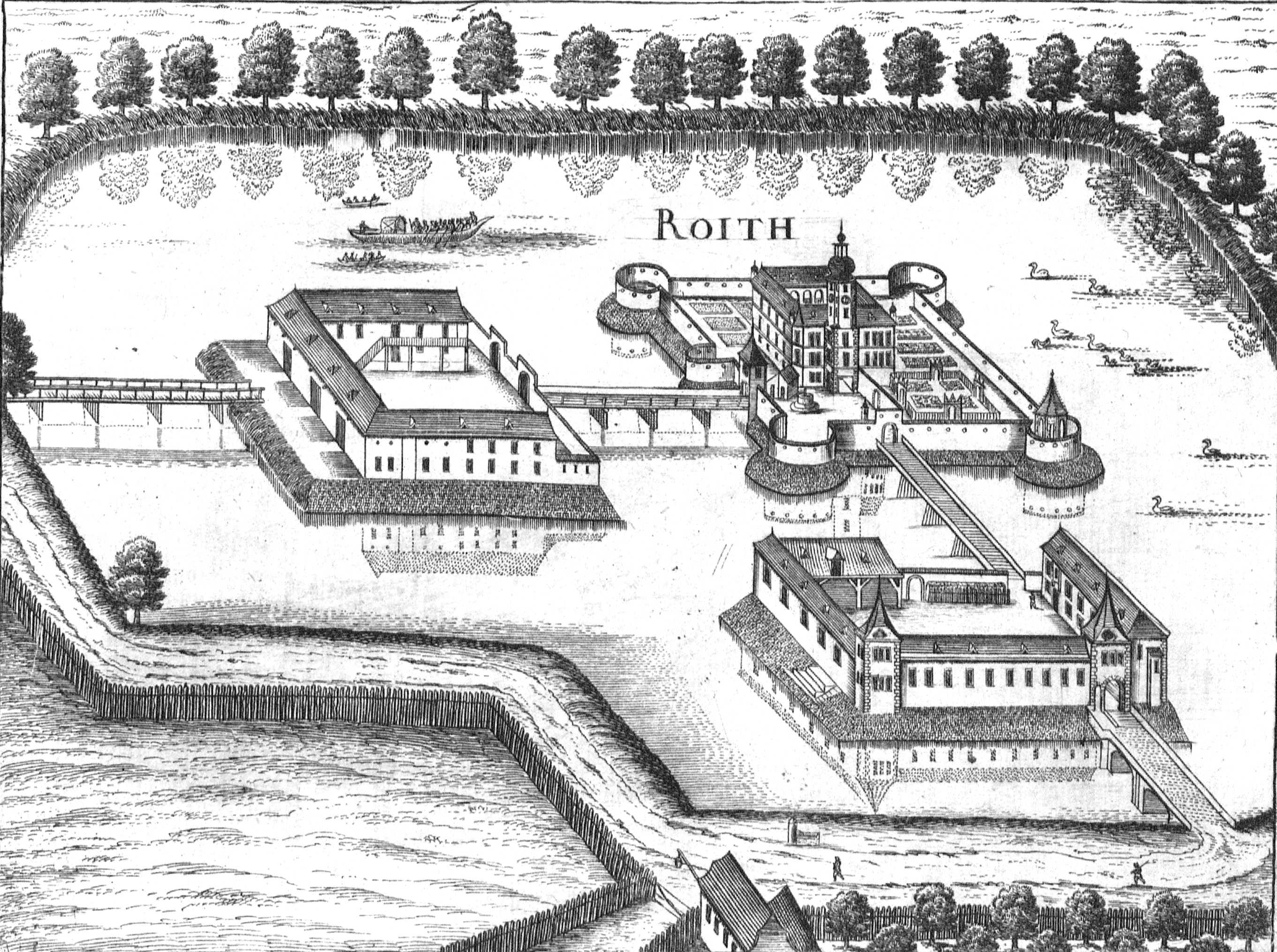 Schloss Roith (Innkreis)